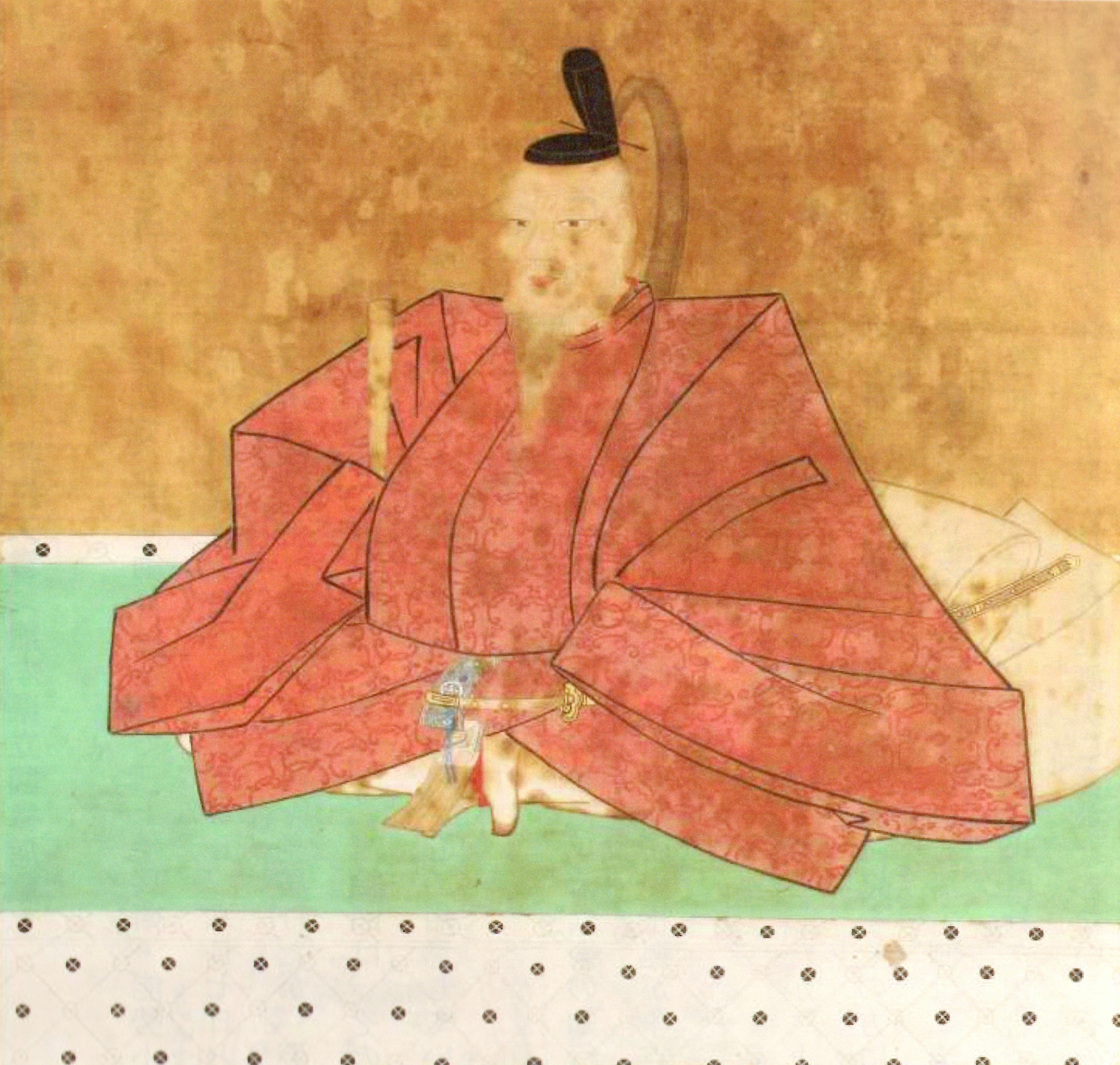 相良頼寛の肖像。